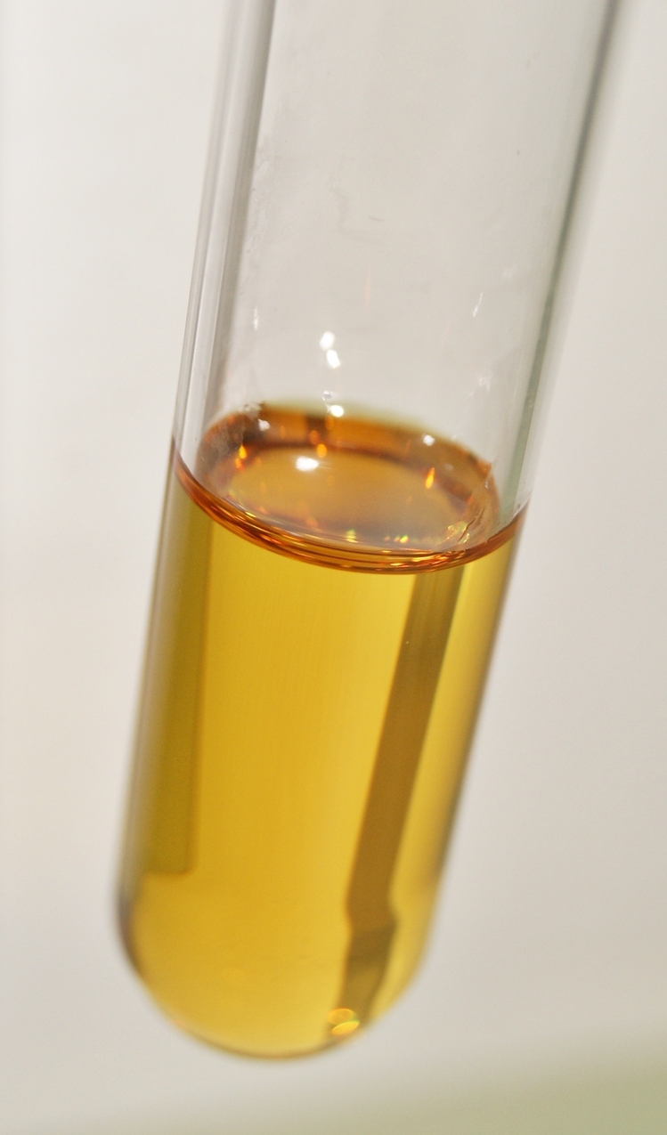 Deitsch: Kalmusöl, Oleum Calami